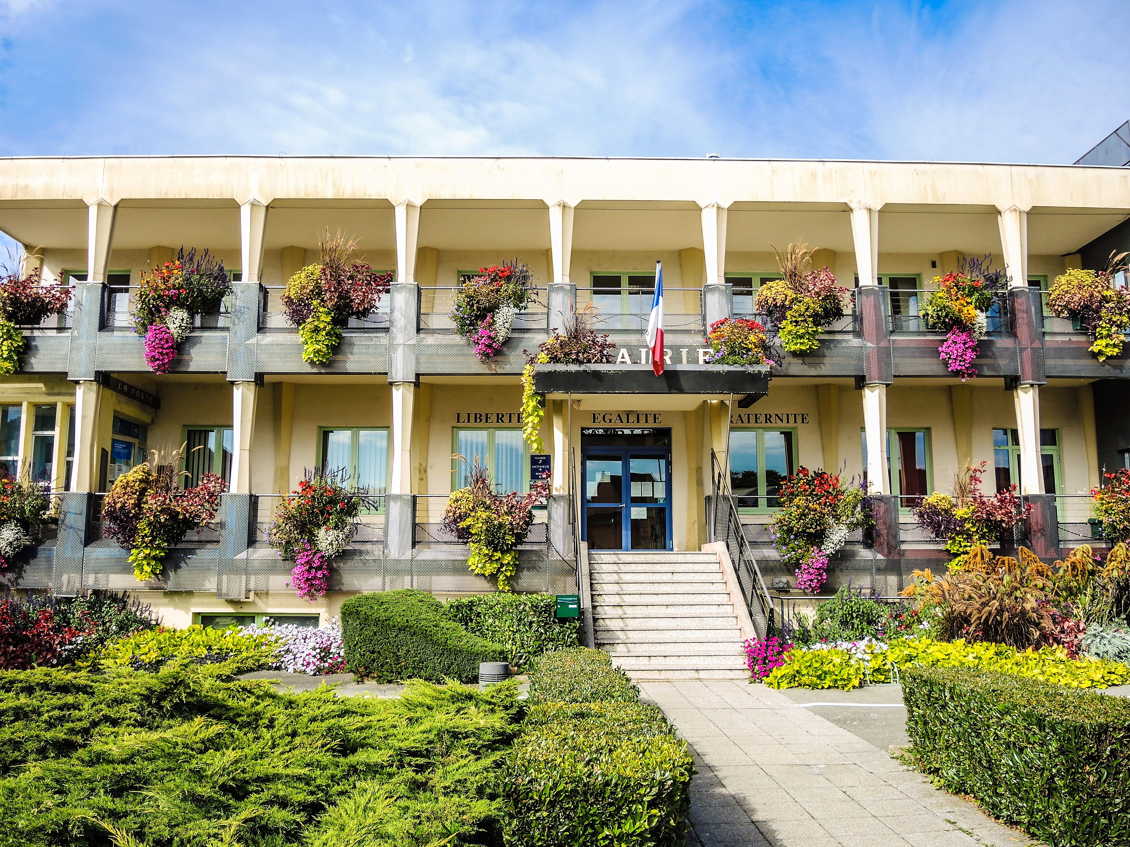 Façade de la mairie de Voujeaucourt. Doubs